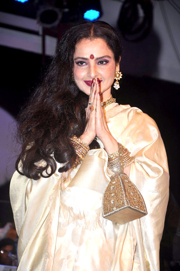 Rekha at Laxmikant - Pyarelal nite